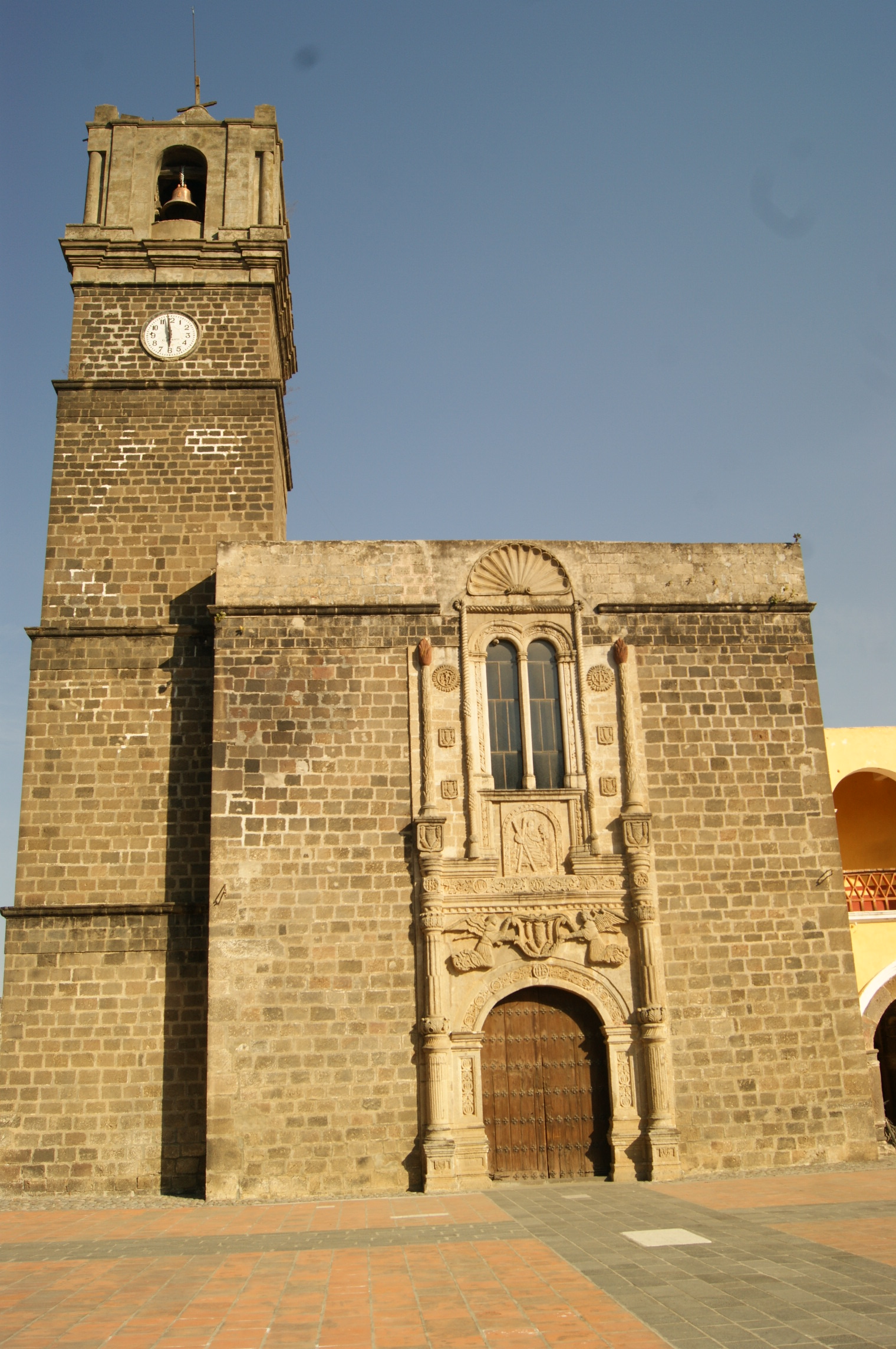 Ex convento de San Andres en Calpan, Puebla